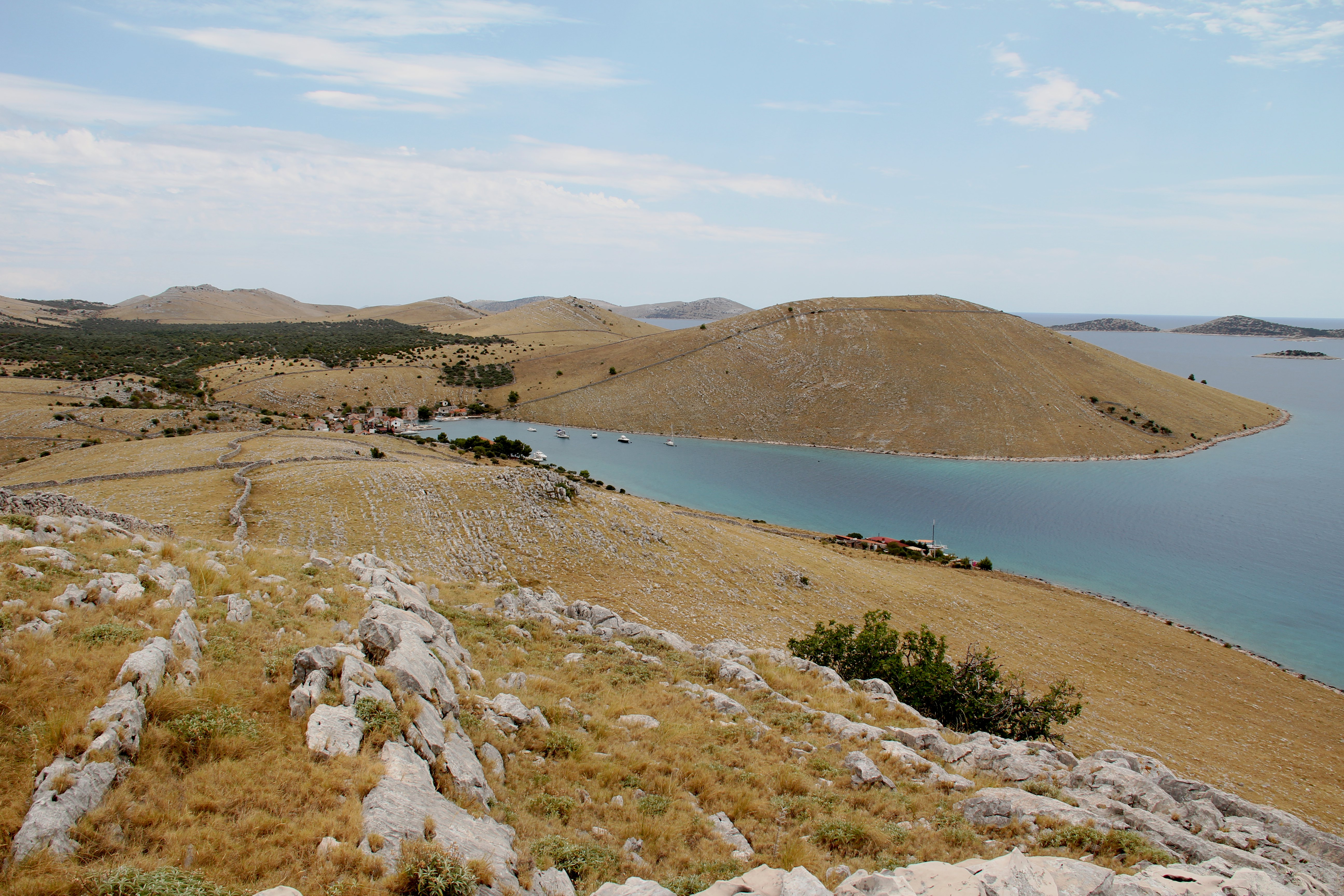 wyspa Kornat w Chorwacji, miejscowosc Vrulje